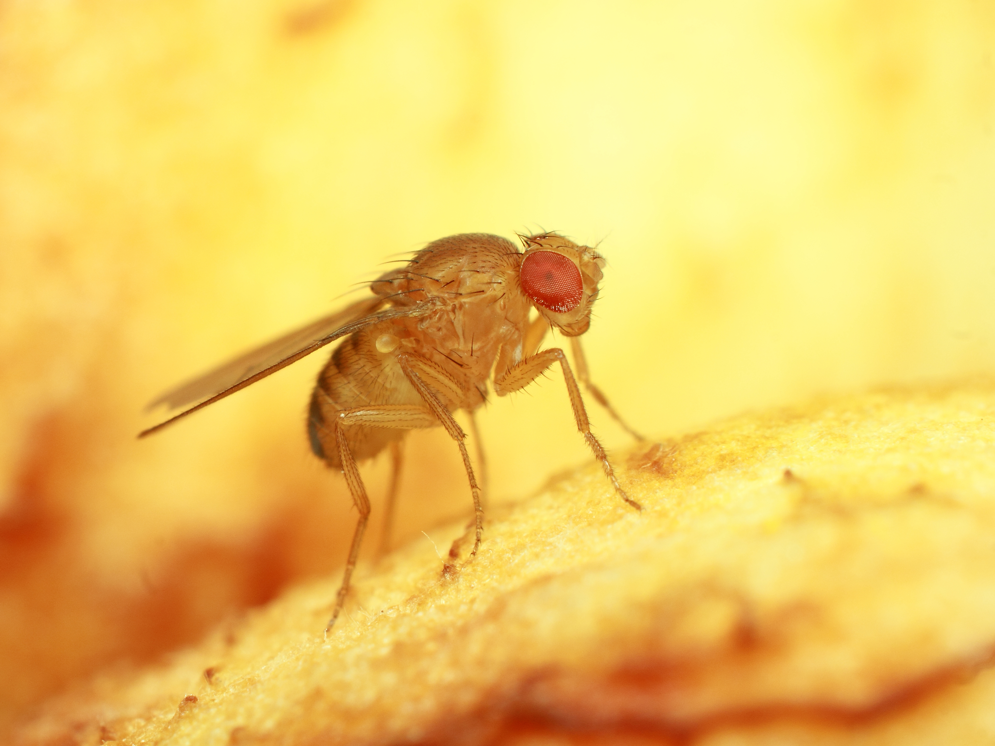 Äädikakärbes õunal